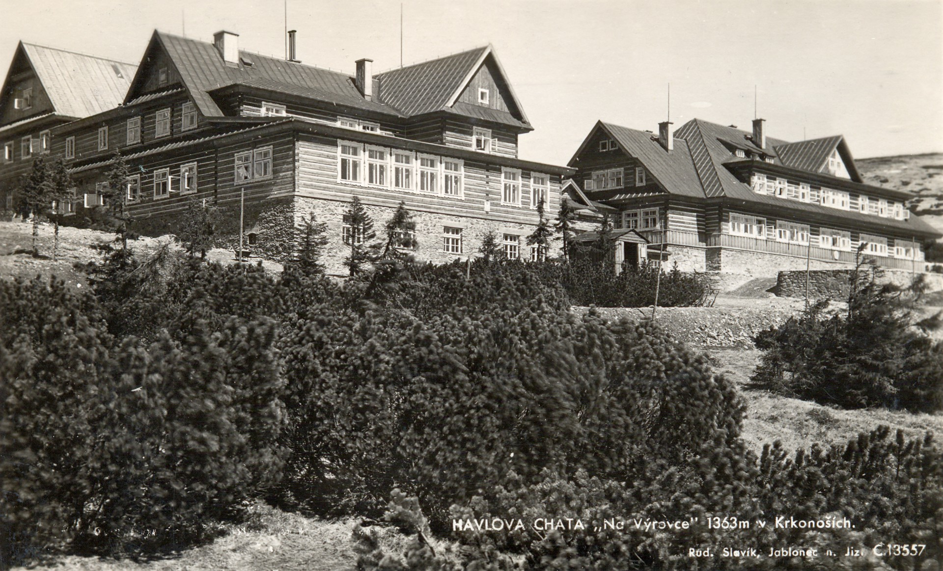 Havlova bouda s Výrovkou v Krkonoších